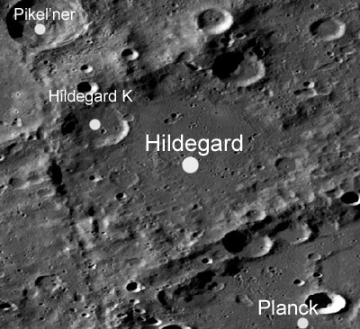 希尔德加德环形山